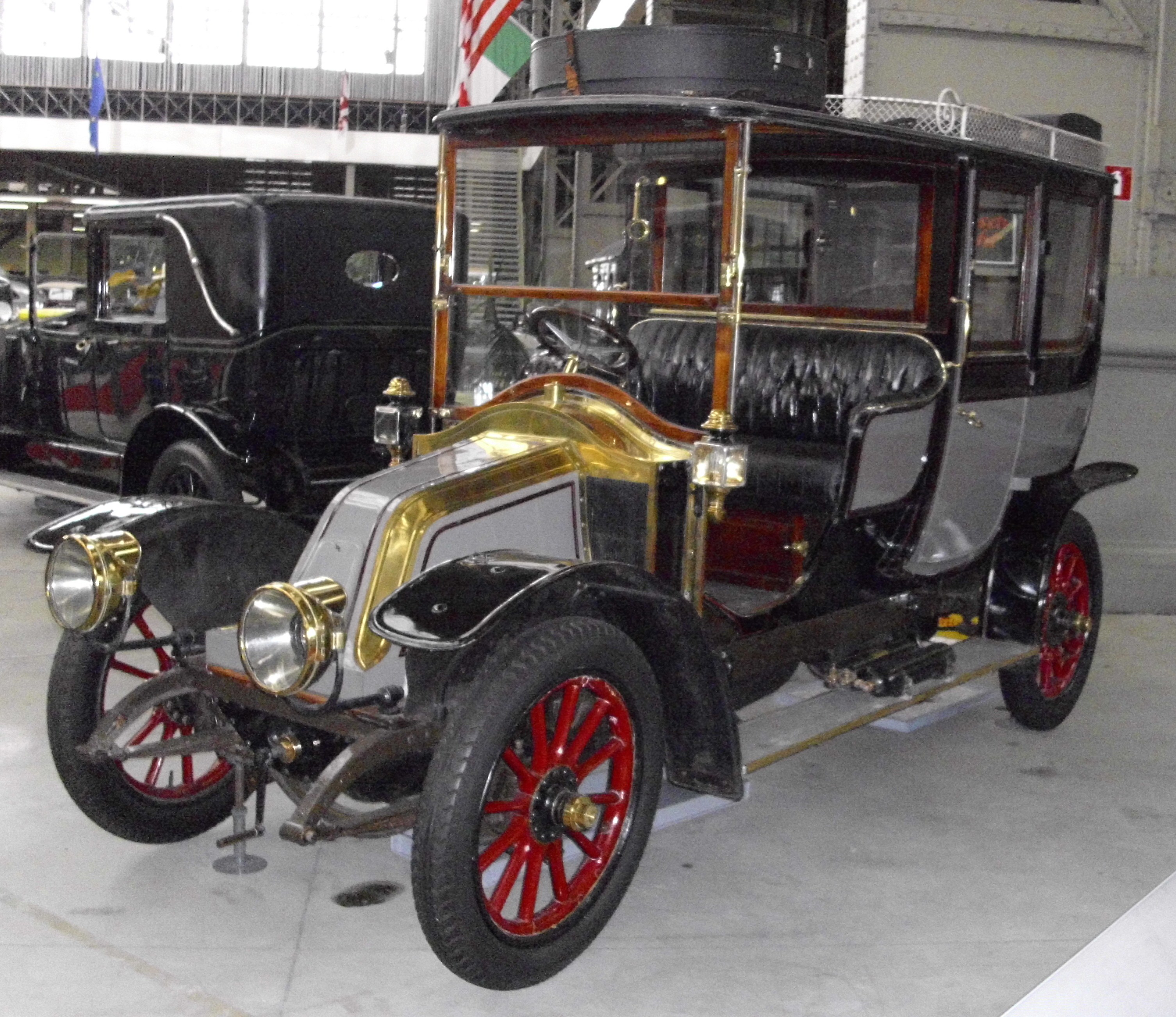 Renault Type X-1 von Bernin 1908